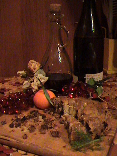 La Pitta 'mpigliata - dolce tipico Silano